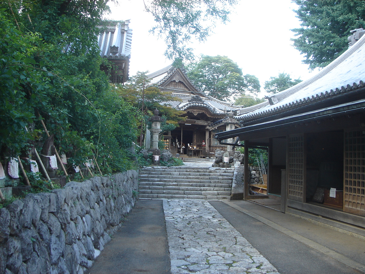 Myoujyourinji01(Temple)(明星輪寺),Ogaki,Gifu,Japan(岐阜県大垣市)で撮影